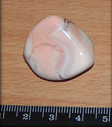 agat polerowany, grudka; pochodzenie Botswana; autor zdjęcia Grzegorz Framski